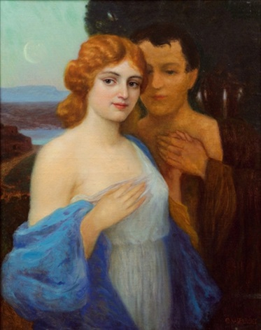 Liebespaar